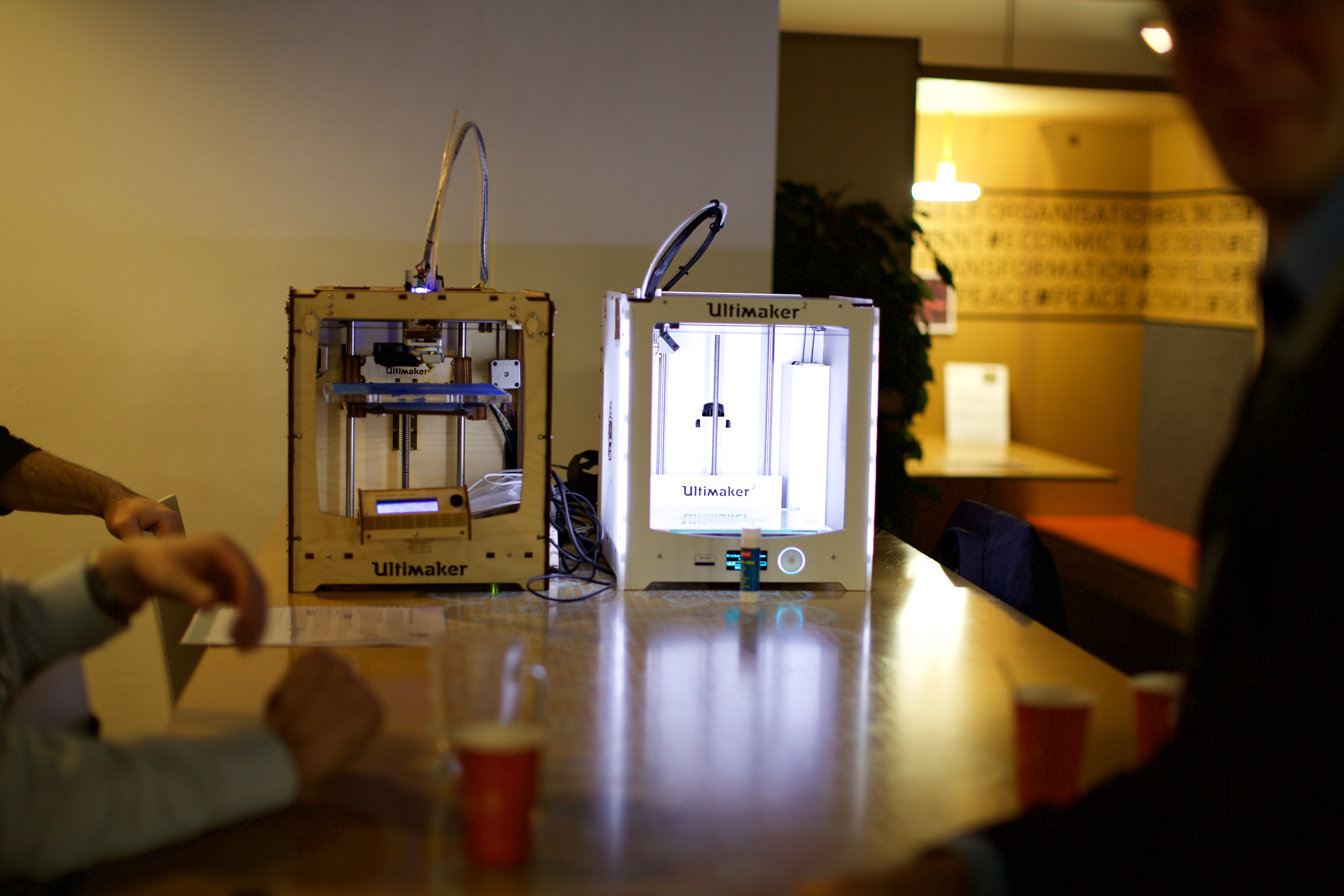 Wikimedia Nederland Conferentie 2014